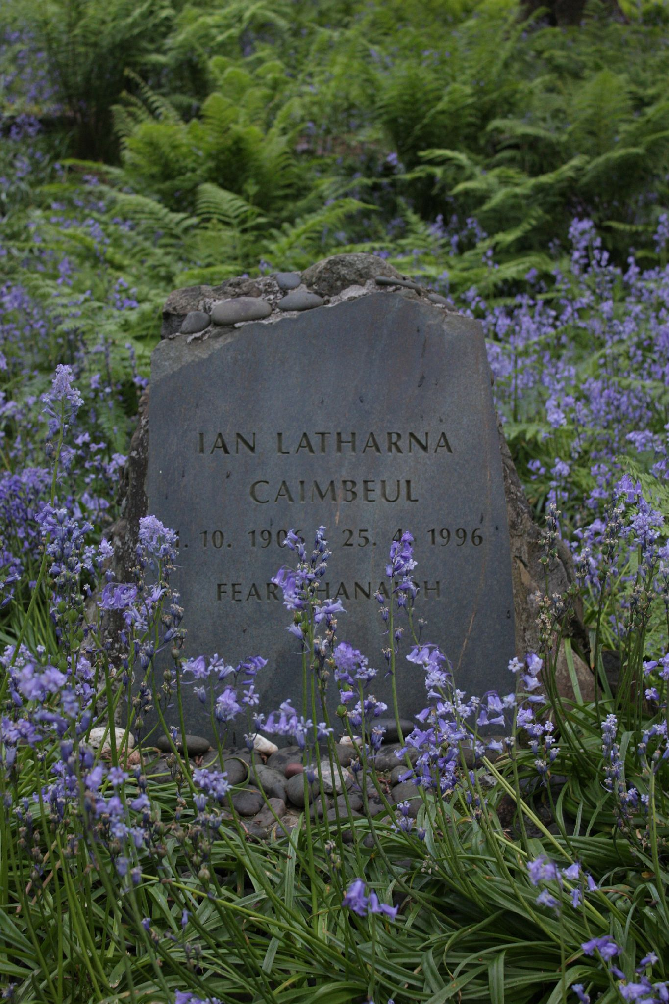 Grabstein Iain Latharna Caimbeul/John Lorne Campbell